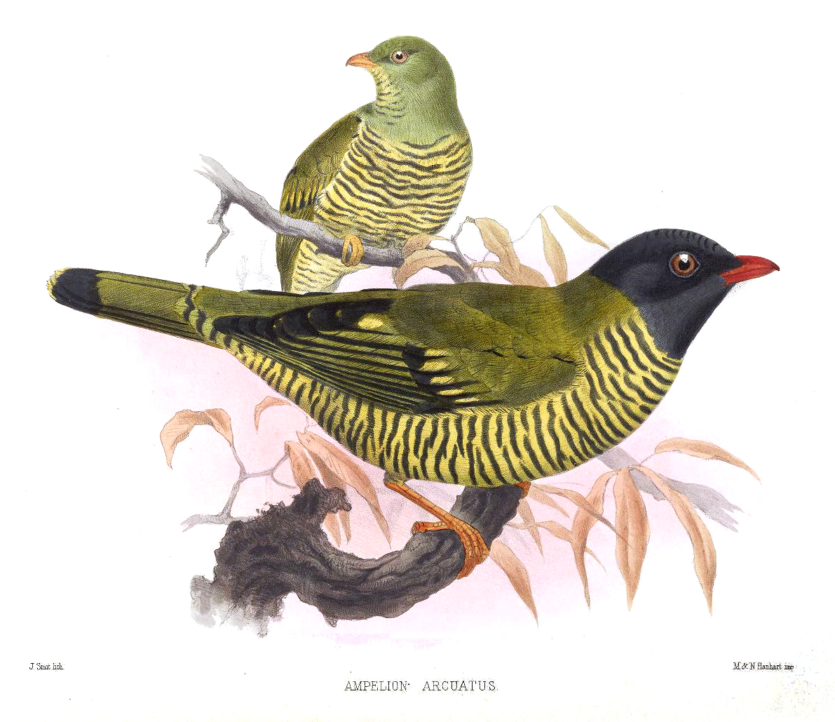 Ampelion arcuatus = Pipreola arcuata